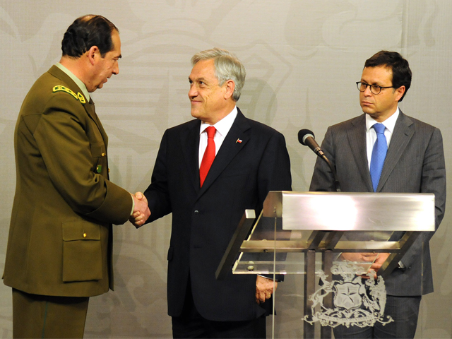 El Presidente de la República, Sebastián Piñera, designó esta tarde al general Gustavo González Jure, como nuevo General Director de Carabineros.